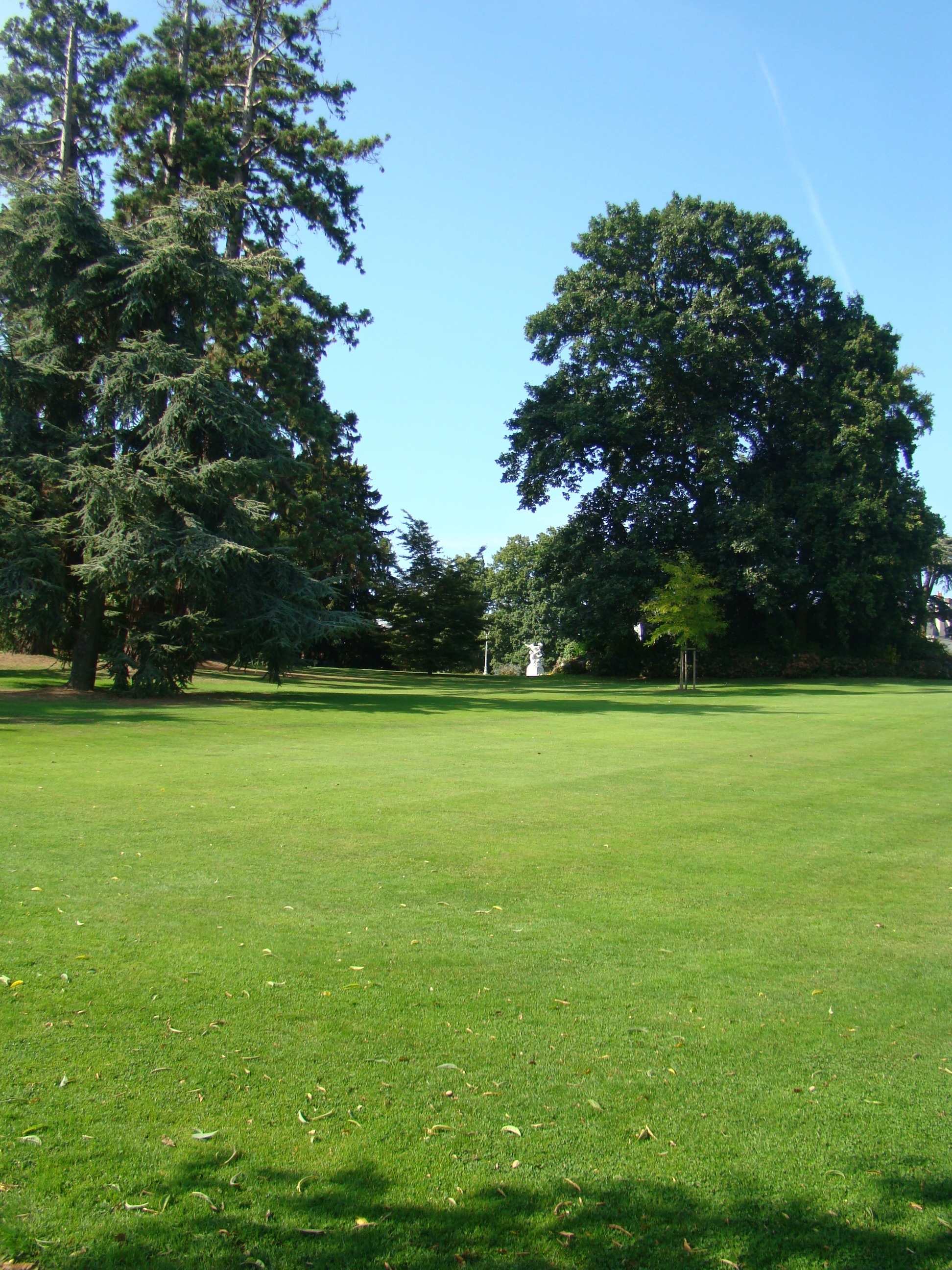 Vue d’une sculpture (L’enlèvement d’Eurydice) du jardin à la française à travers la pelouse et les arbres du jardin paysager.